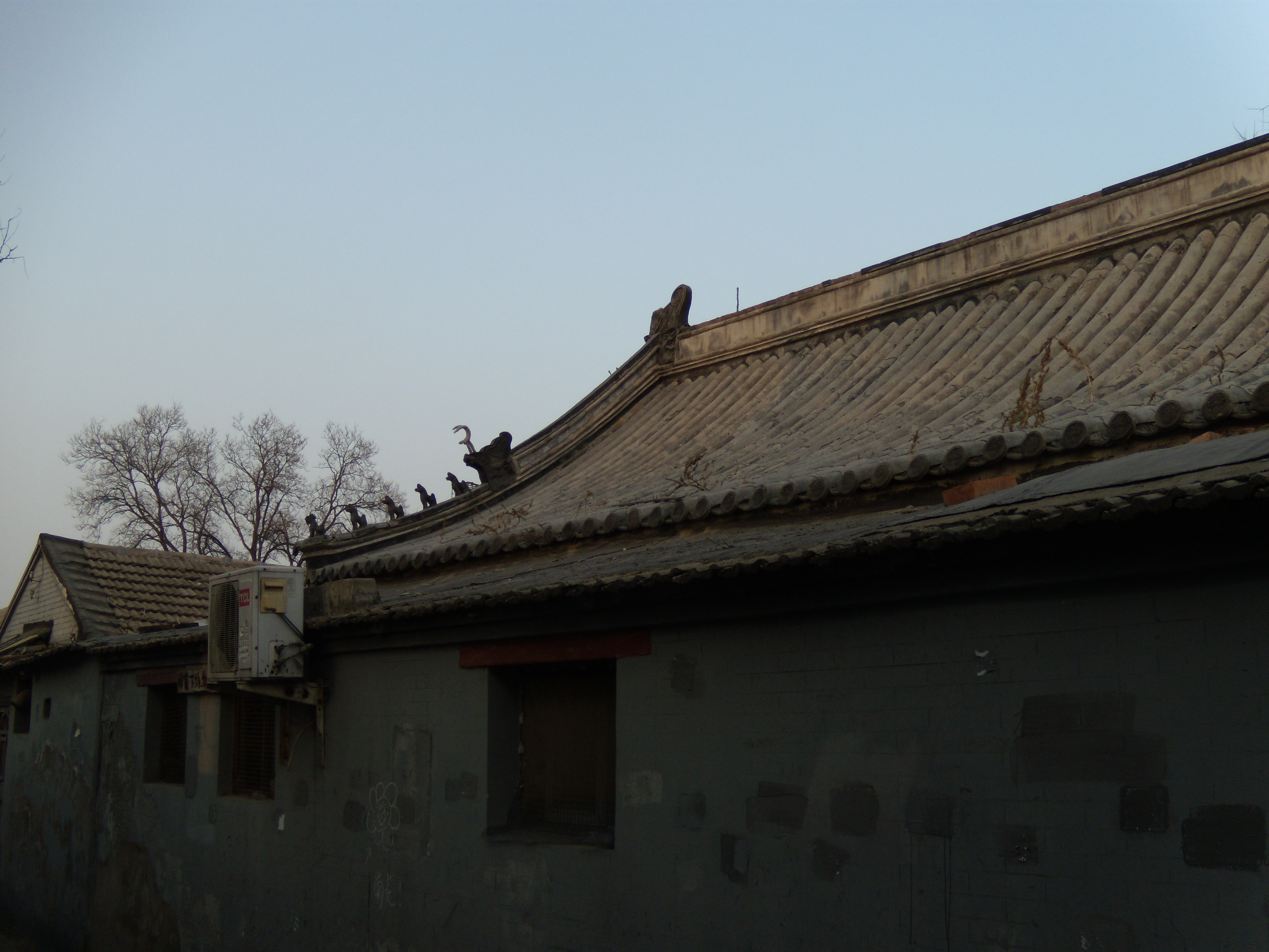 北京护国寺